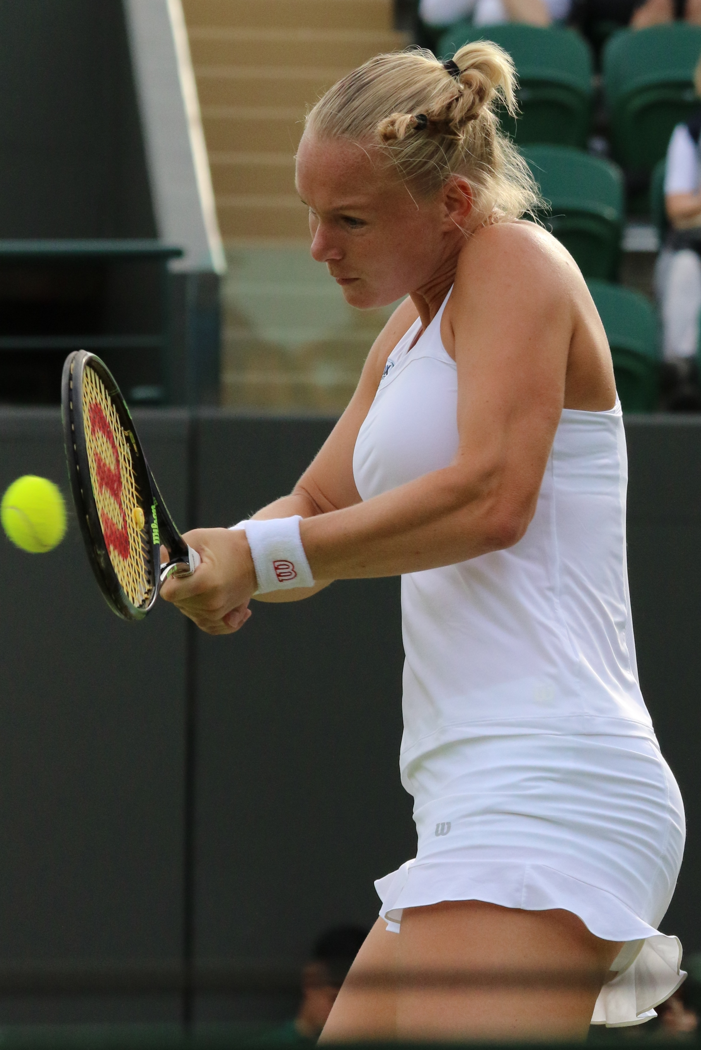 Bertens WM16 (1)